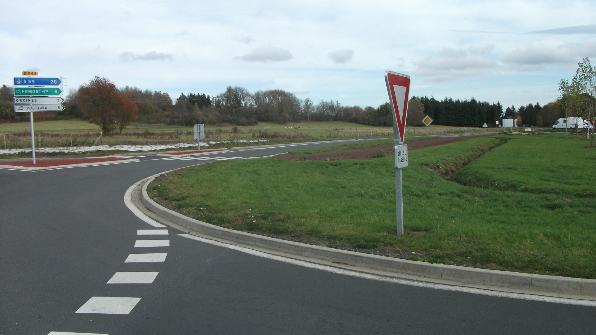 La RD 942 en direction de A 89 (20 km), Clermont-Ferrand (9 km), Orcines (2 km), Vulcania (8 km) Ensemble de panneaux implantés en 2009 ou 2010 Franche-Comté signaux 2009, suite à la création d'un carrefour giratoire.